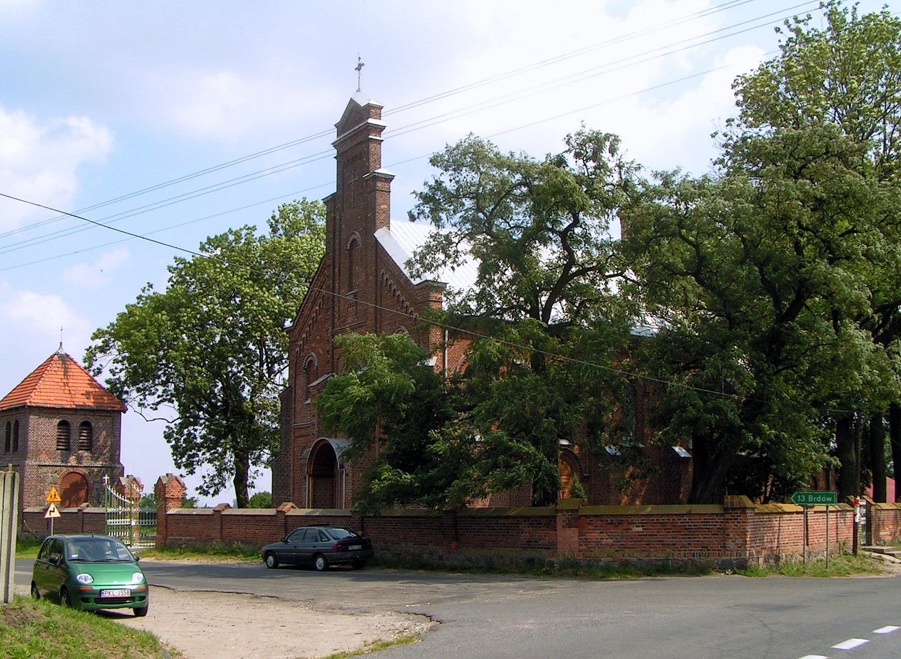 Kościół św. Dominika w Bierzwiennie Długiej